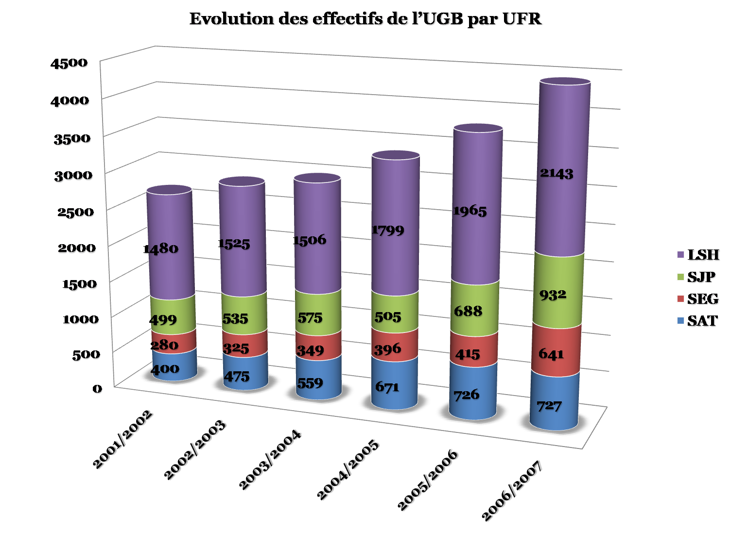 Graphique de l'évolution du nombre d'étudiant à l'université Gaston Berger de Saint-Louis